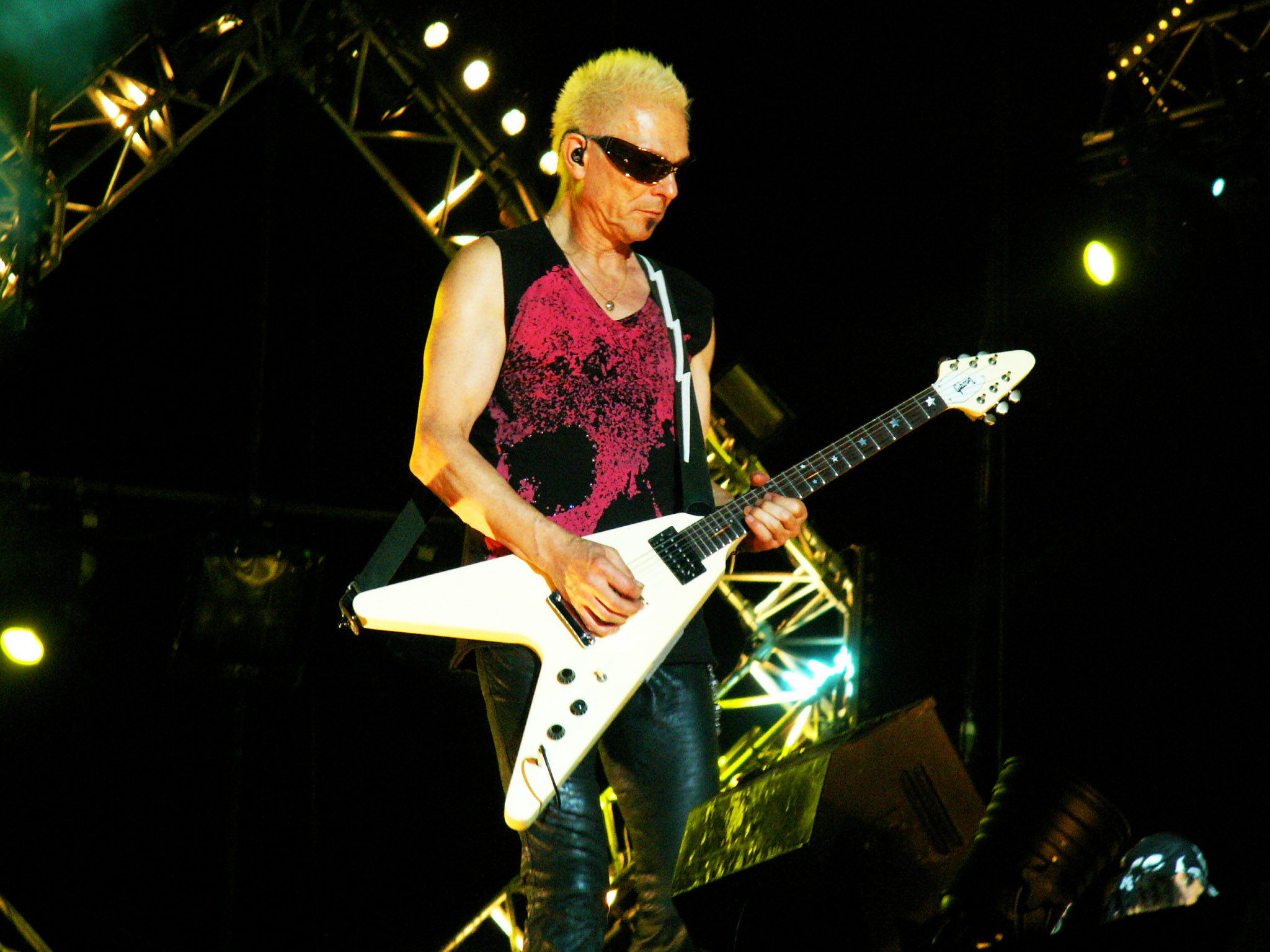 Rudolf Schenker au Festival de Bobital en 2008